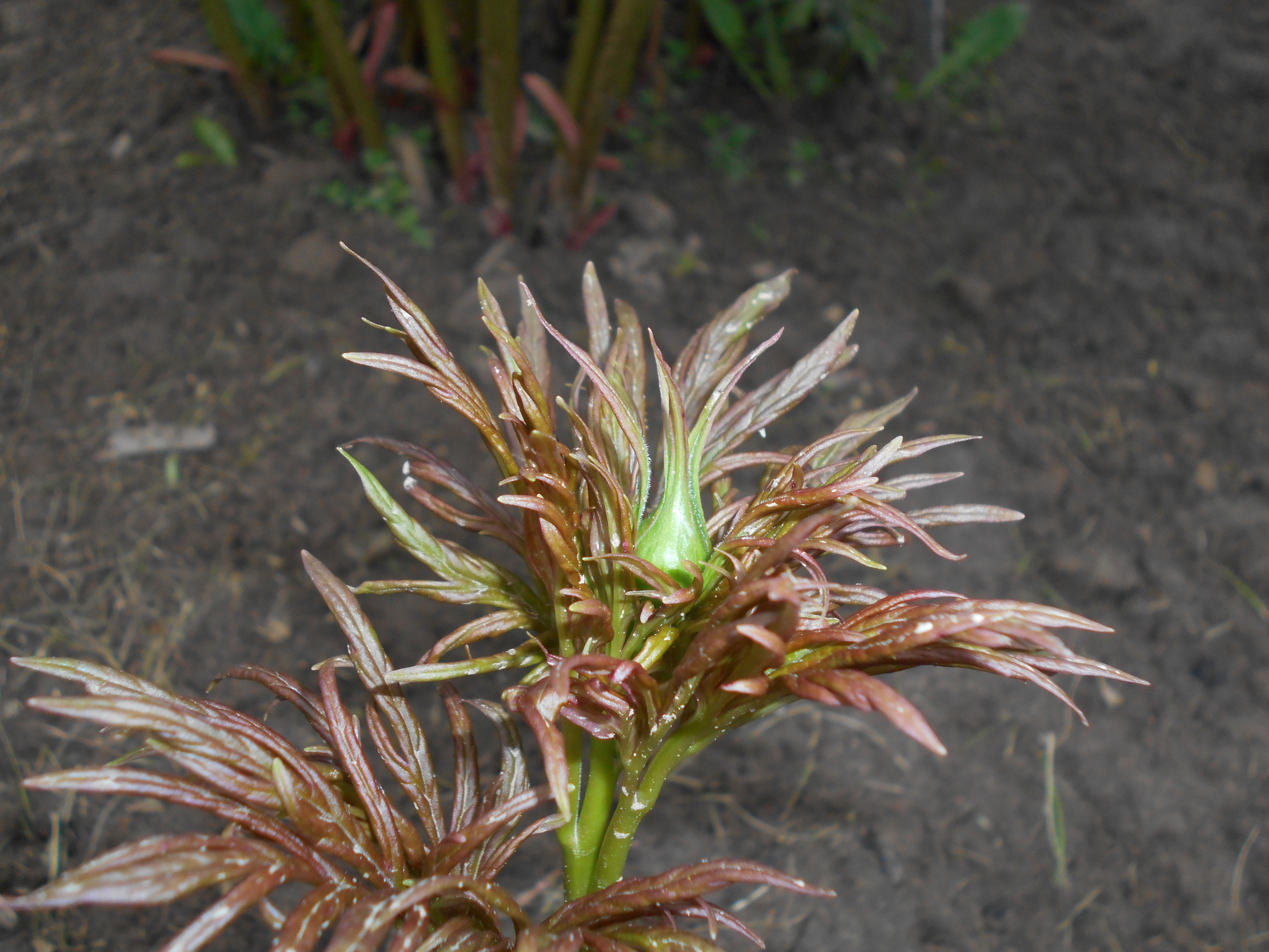 Piwonia odmienna (Paeonia anomala), Ogród Botaniczny UMCS w Lublinie